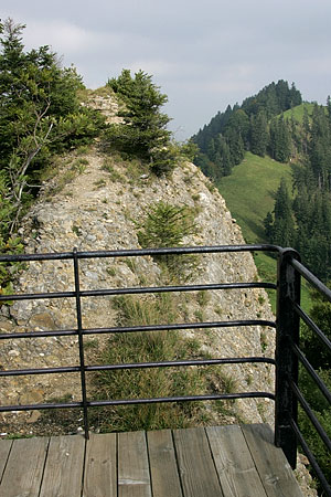 Aussichtspunkt Guggishörnli in Guggisberg